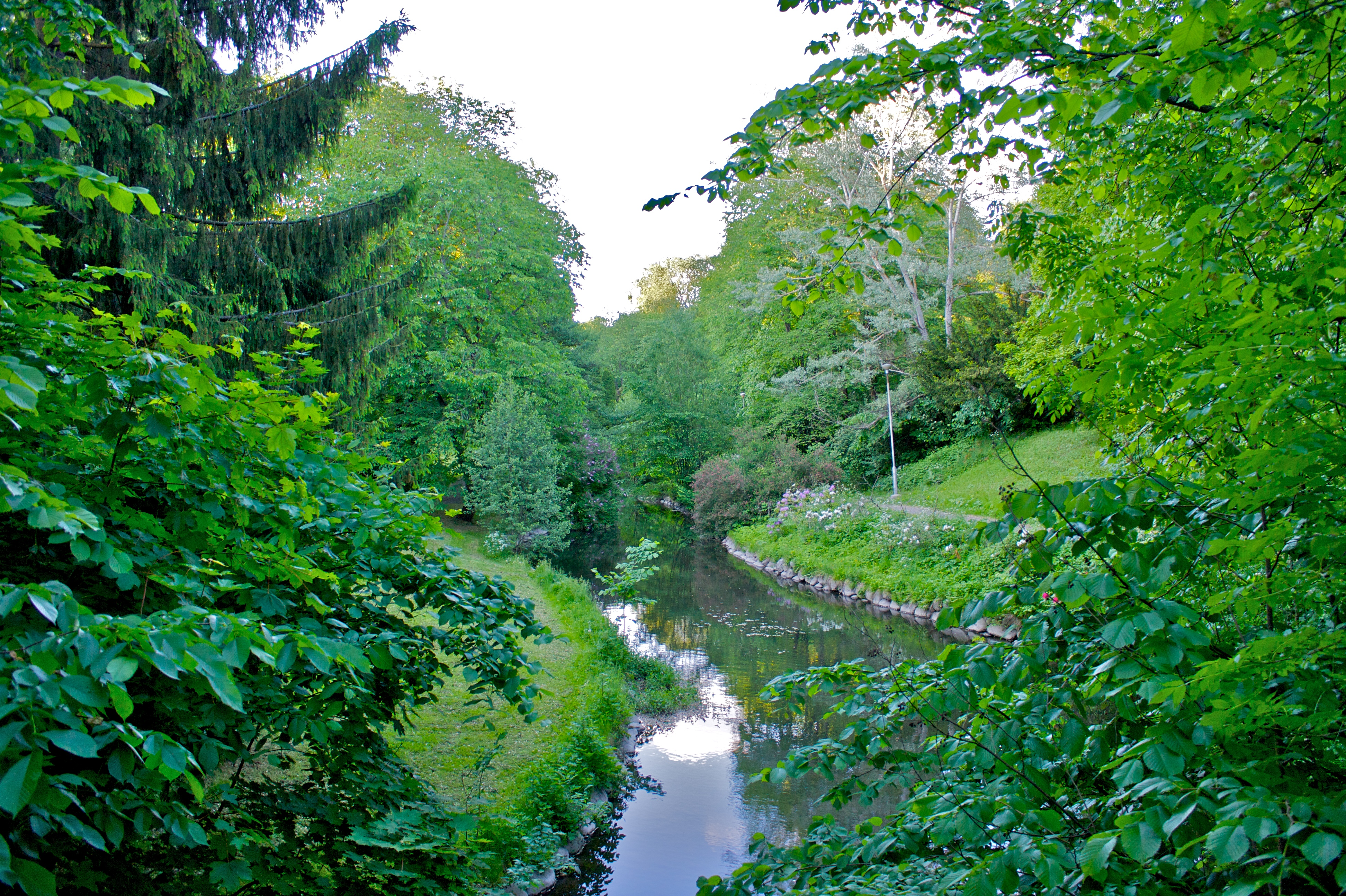 Frognerbekken i Oslo.